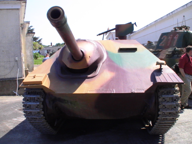 Hetzer à saumur (encore en état de marche)